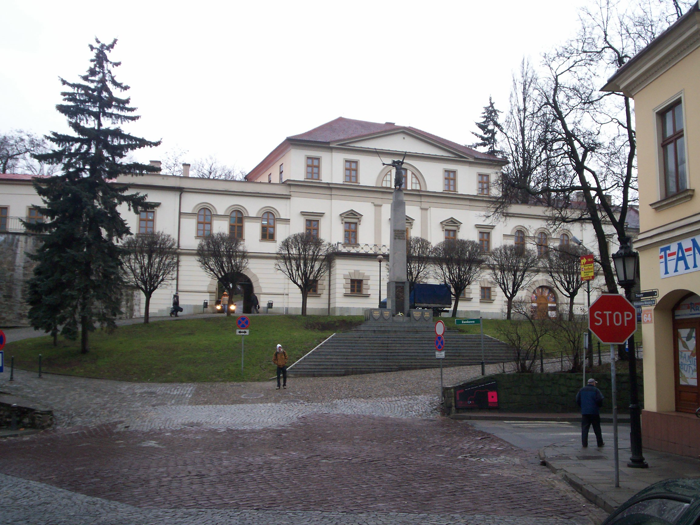 Cieszyn, pałac Habsburgów na Wzgórzu Zamkowym. Przed frontem pałacu widoczny Pomnik Legionistów Śląskich.